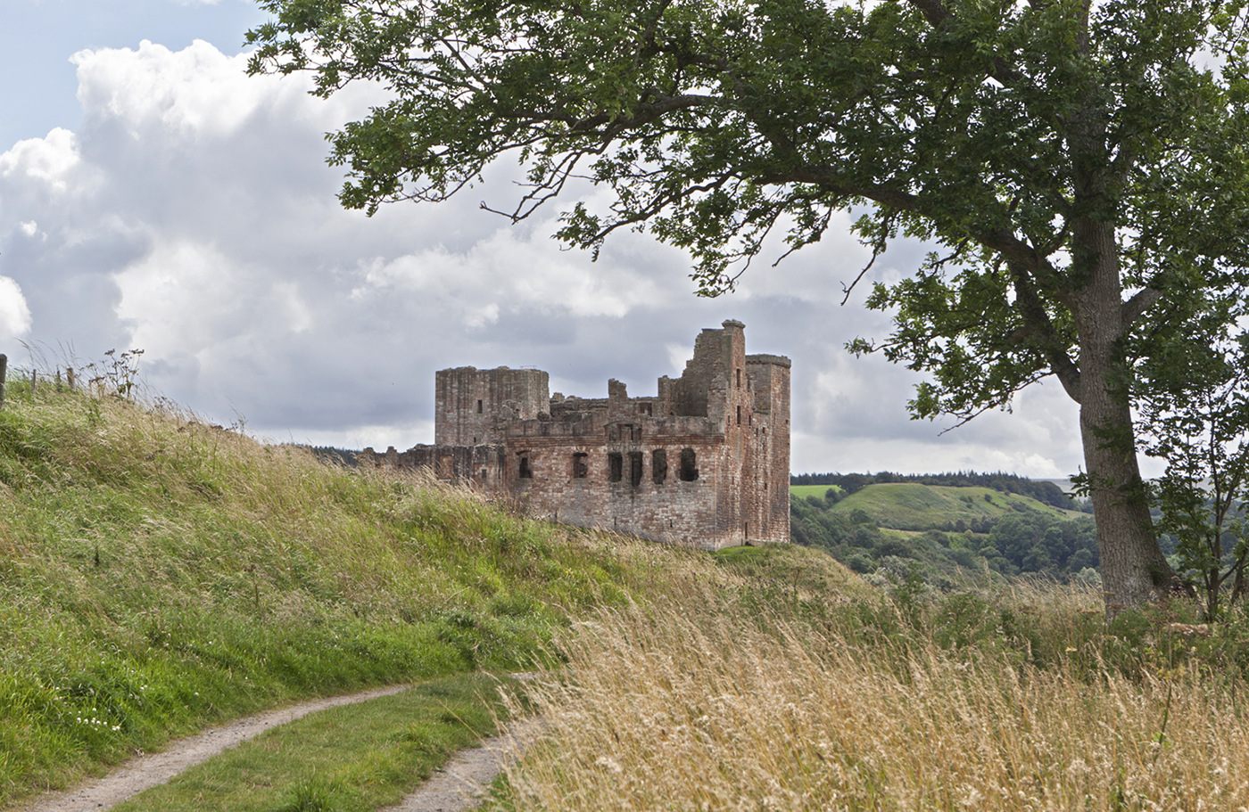 Crighton Castle, Schottland